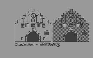 C64 Hires-Grafik von Flensburgs Nordertor die ich damals mit GEOS 64 (GeoPaint) pixelte (Version ohne den Border)